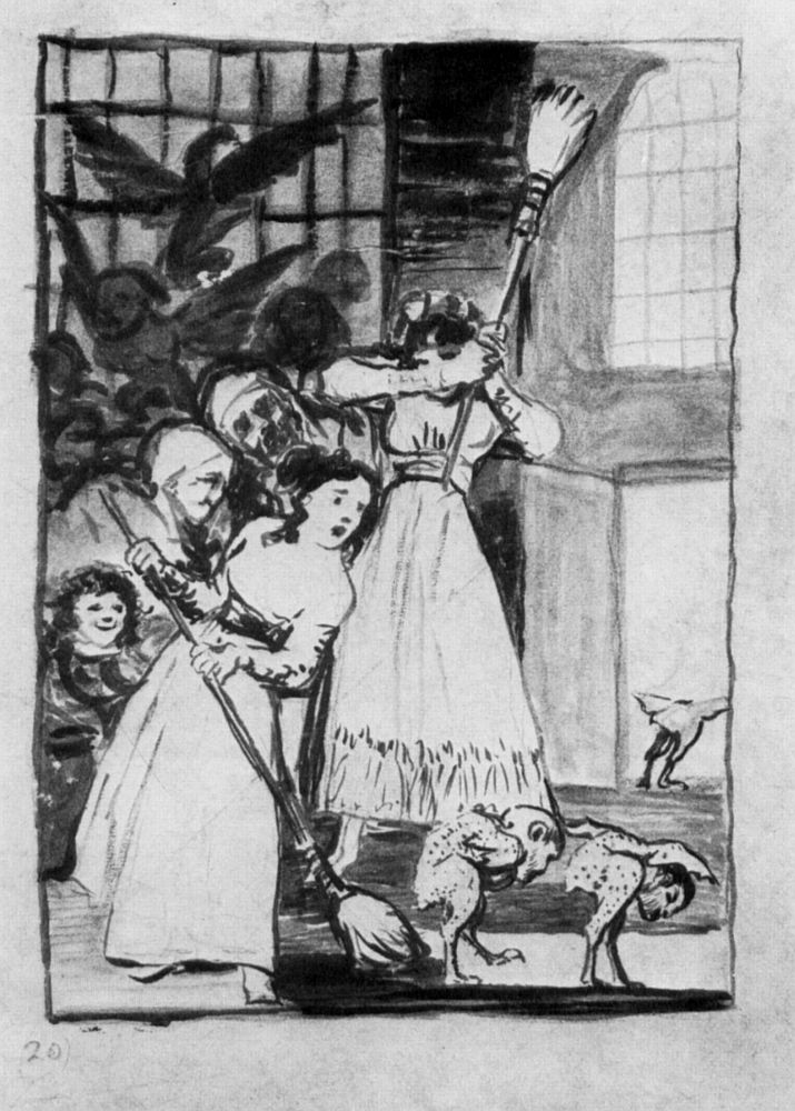 Dibujo preparatorio 1 del capricho nª 20.